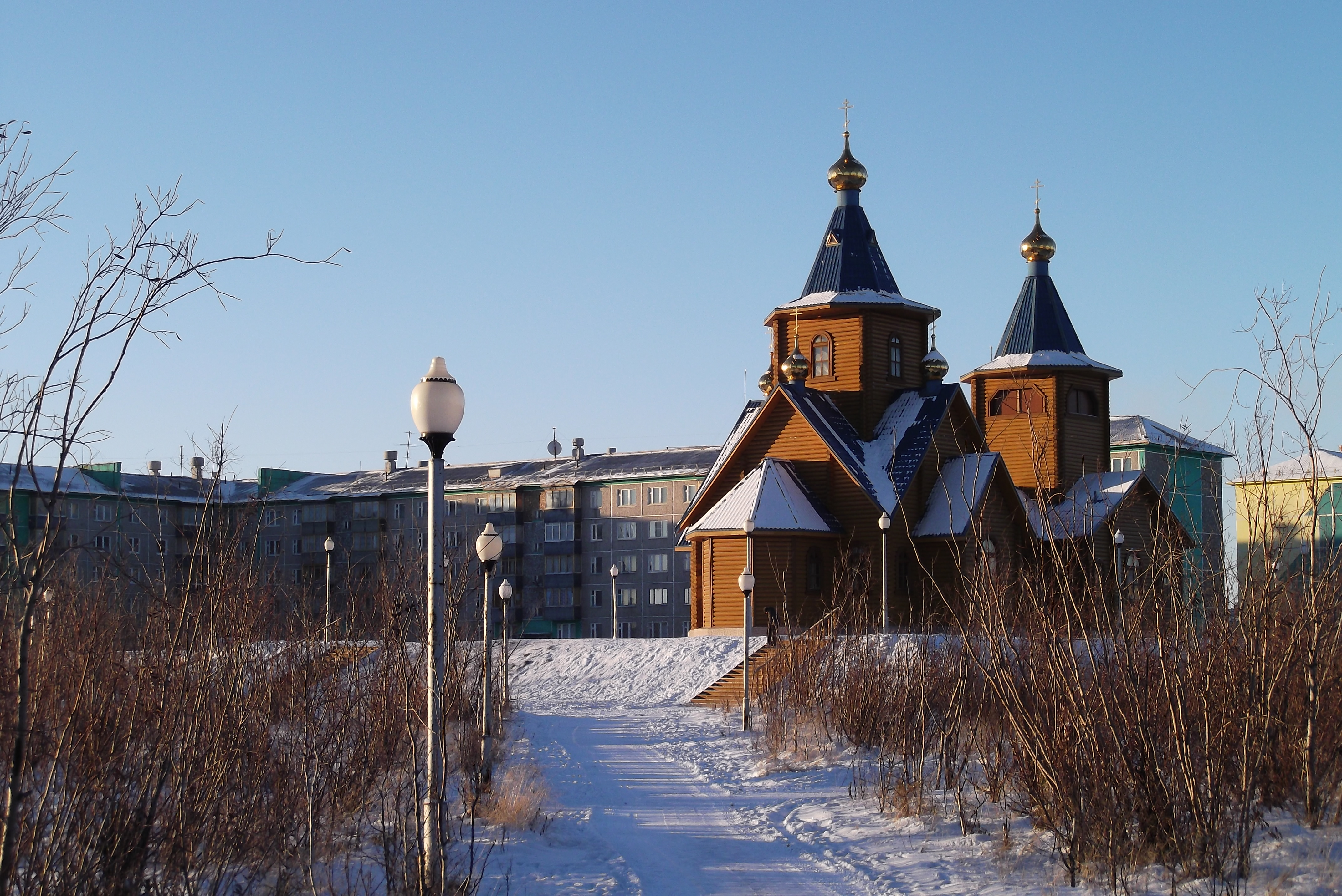 Vorkuta, Komi Republic, Russia